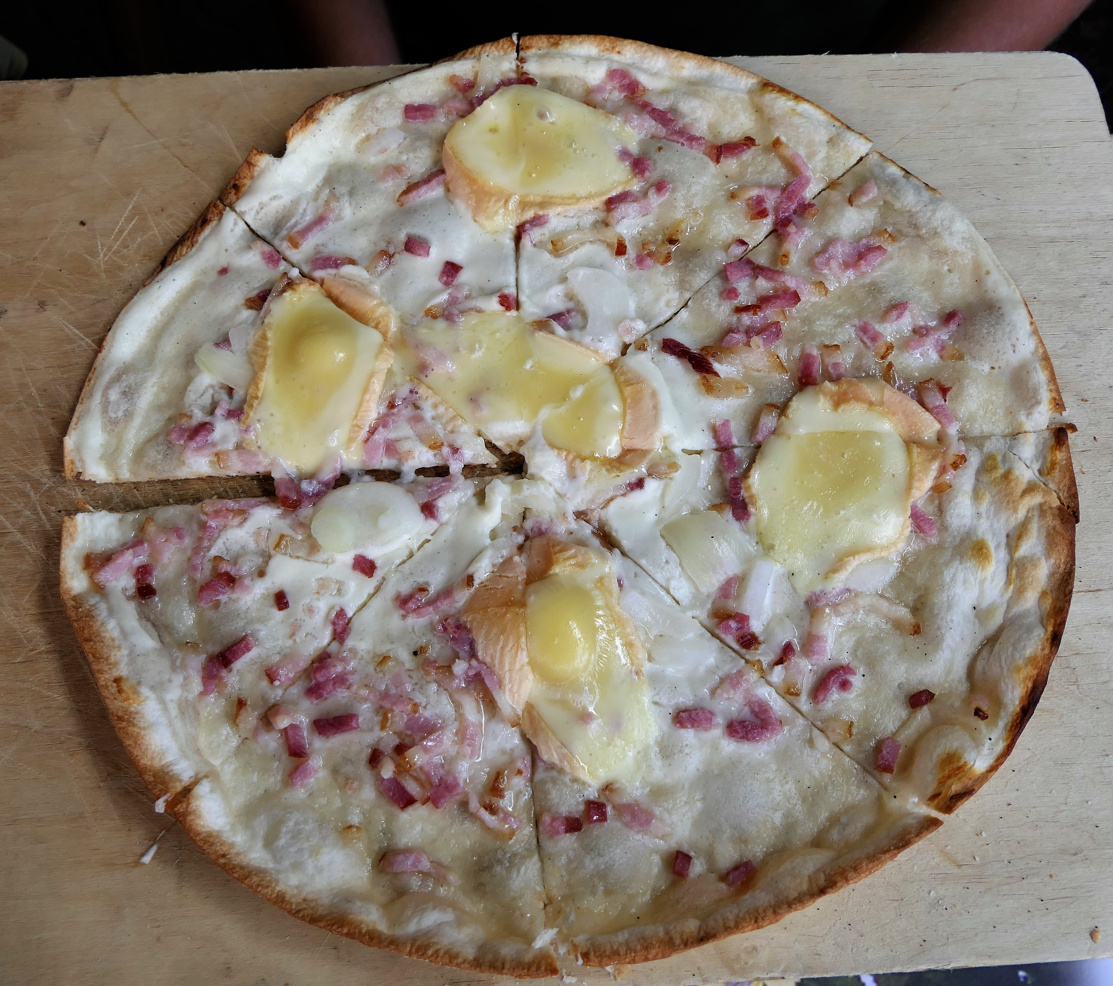 Elsässer Flammkuchen mit Munster-Käse in Kaysersberg